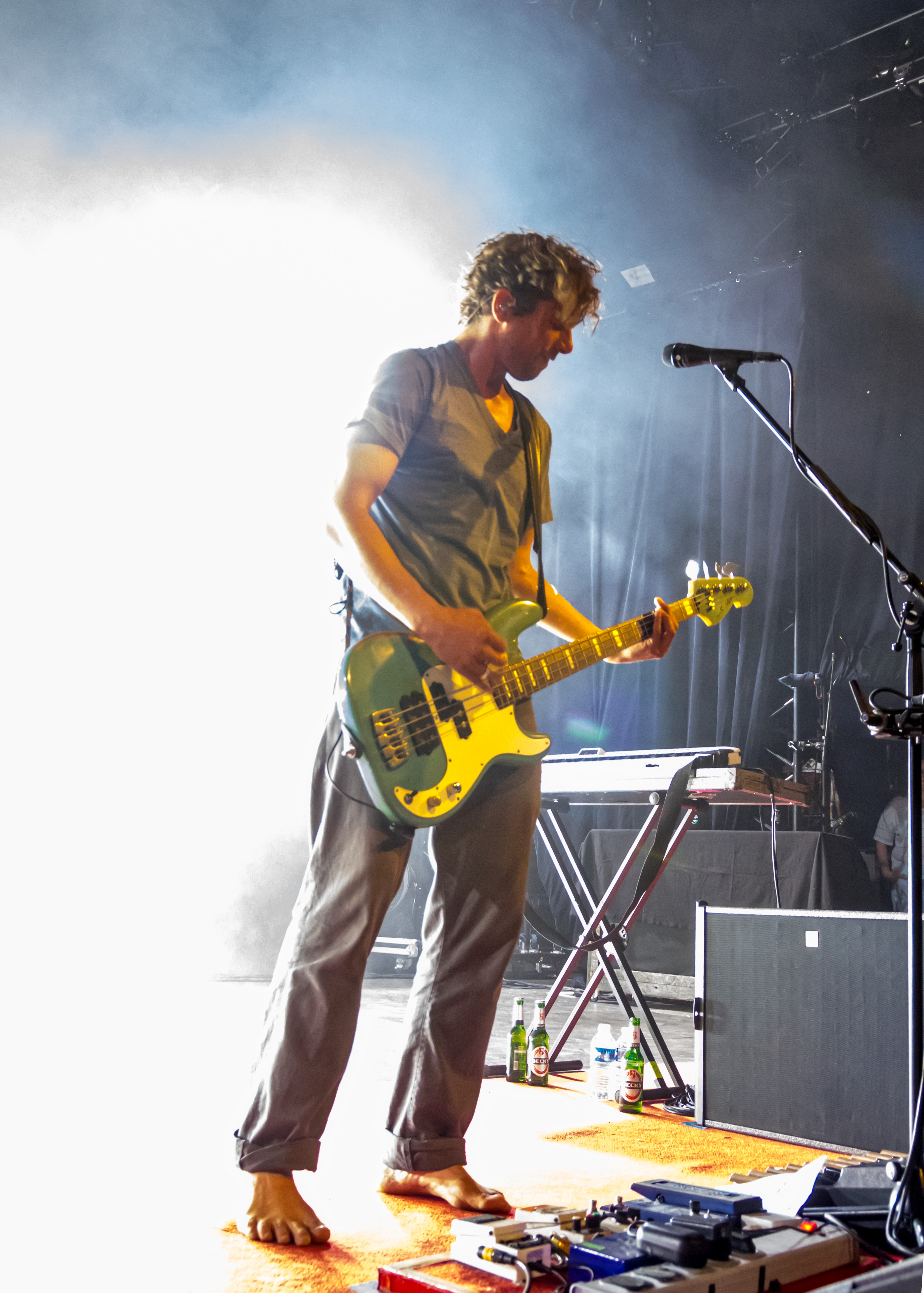 Bilder vom Zelt Musik Festival 2017 in Freiburg im Breisgau Sportfreunde Stiller am 18.07.2017